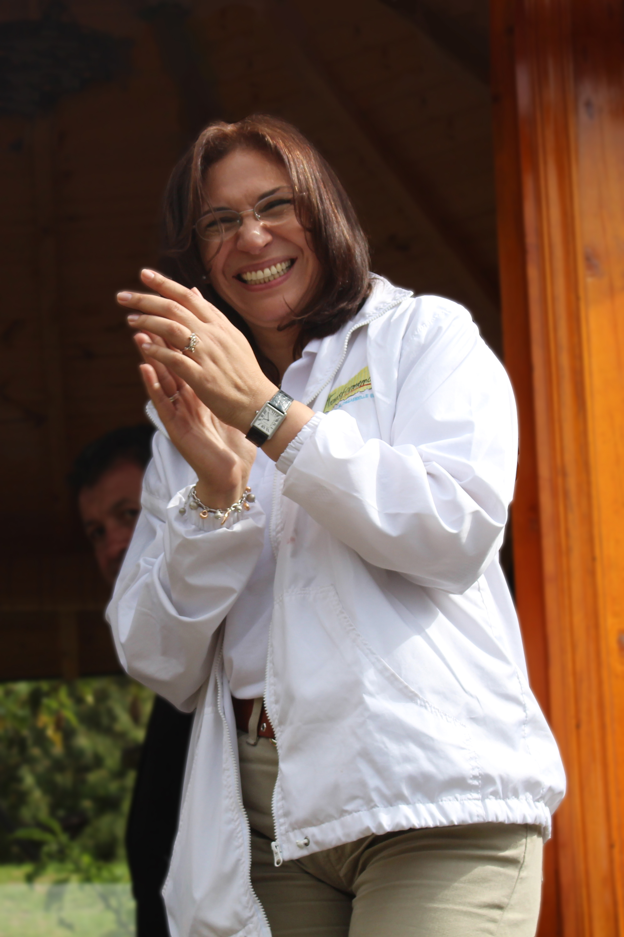 Fotografía de María Aurora Carrillo, Directora ejecutiva y pedagógica de la Fundación Transformemos